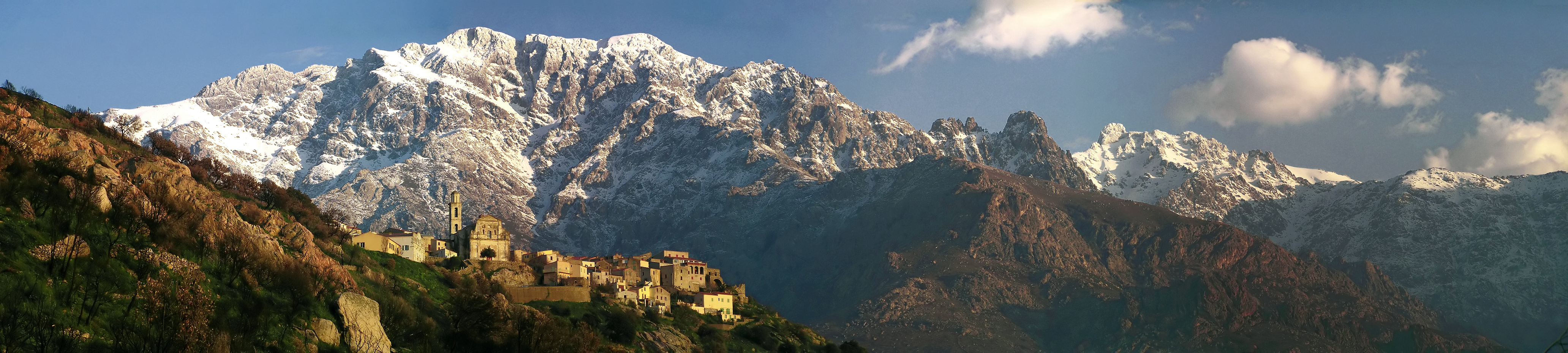 Panoramique sur le village de Montemaggiore avec en fond le massif de Monte Grosso